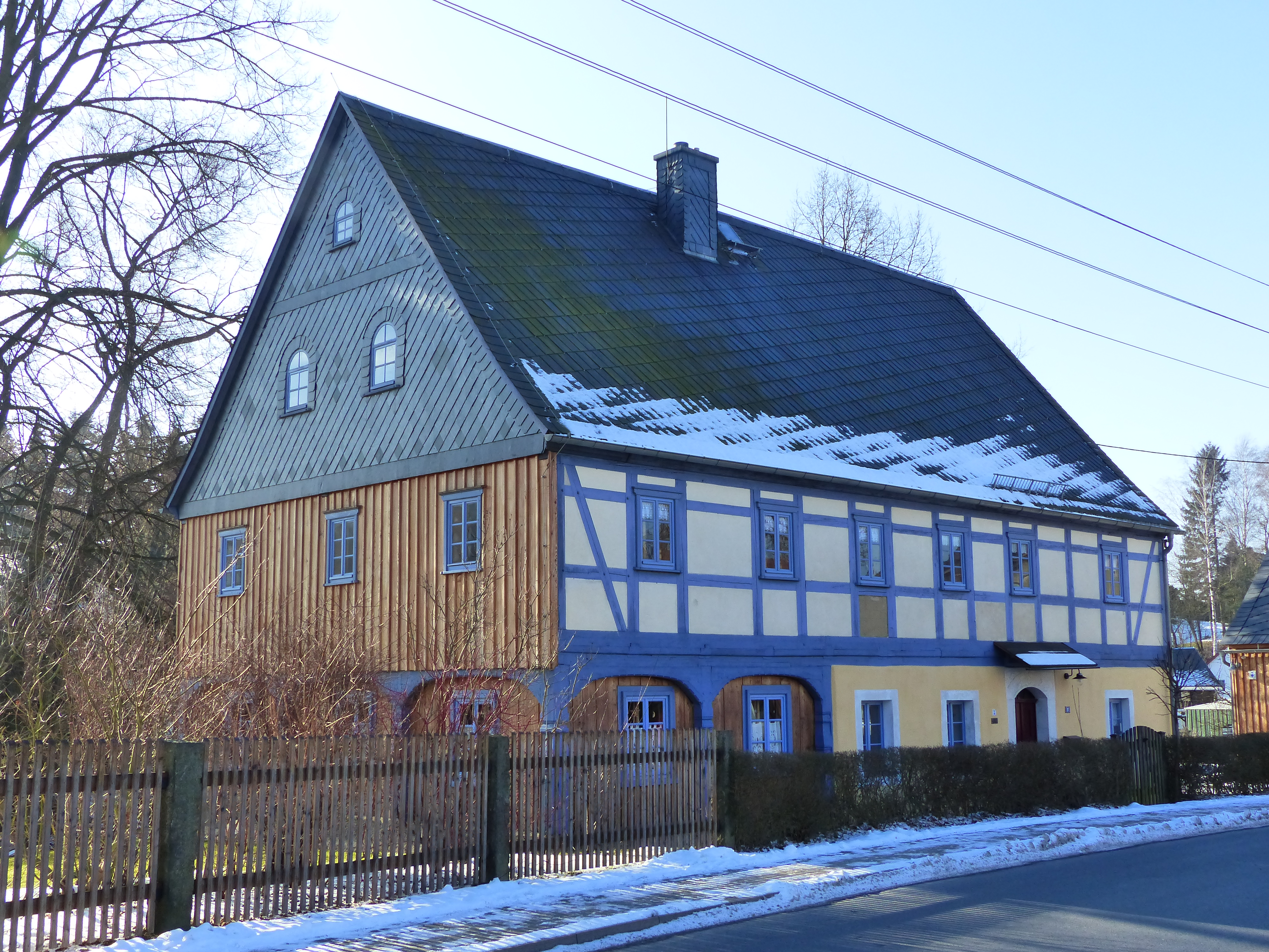 Denkmalgeschütztes Umgebindehaus, ehem. Schule, Polenztalstraße 81, Polenz, Neustadt in Sachsen